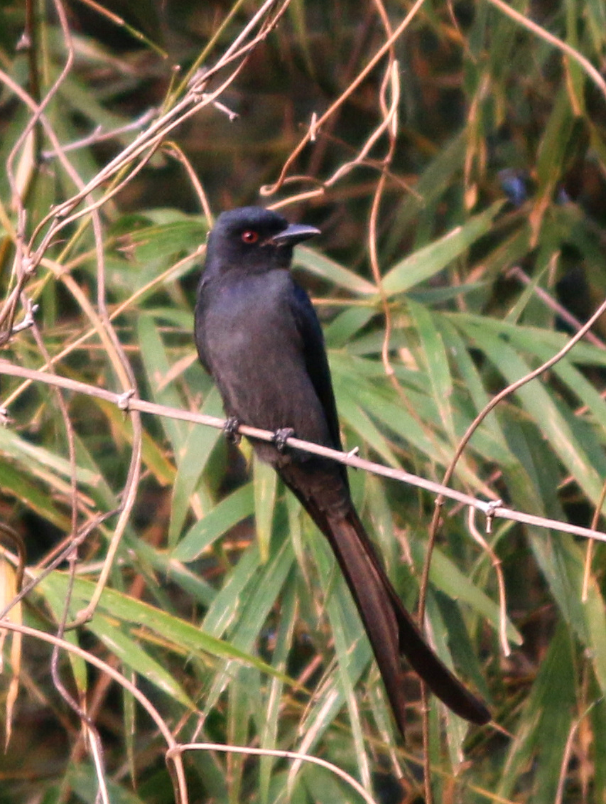 Ashy drongo കാക്കത്തമ്പുരാൻ, കാക്കത്തമ്പുരാട്ടി, പാലക്കാട് ജില്ലയിലെ കൂറ്റനാട് നിന്നും എടുത്ത ചിത്രം